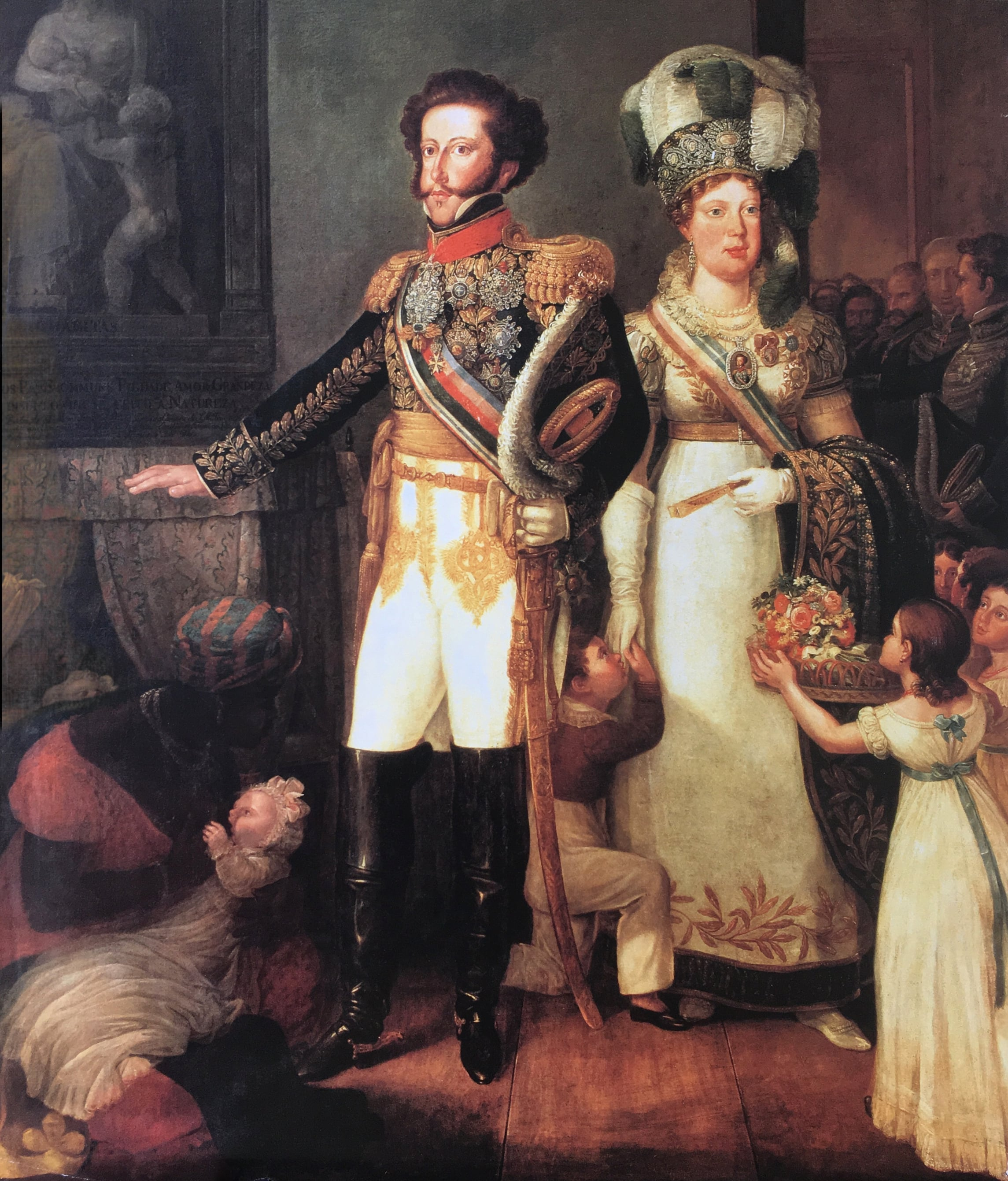 Dom Pedro I e Dona Leopoldina visitando a Casa Dos Expostos, atualmente o orfanato Romão Duarte no Flamengo, RJ.